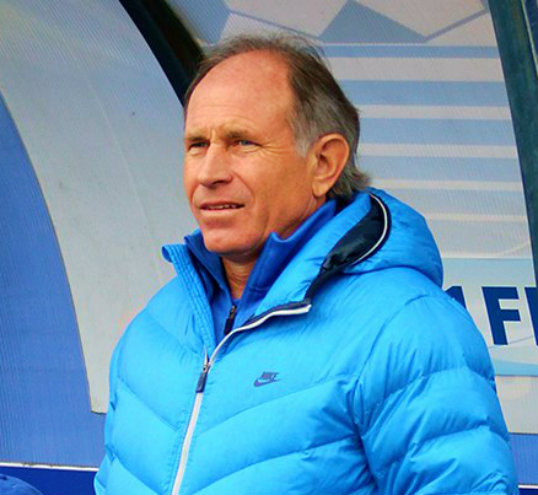 Евгений Николаевич Перевертайло, главный тренер ФК Балтика Калининград